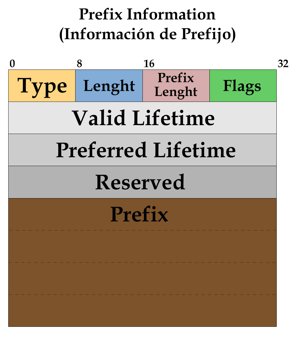 Formato de mensaje de opción ICMPv6 sobre el prefijo IPv6.